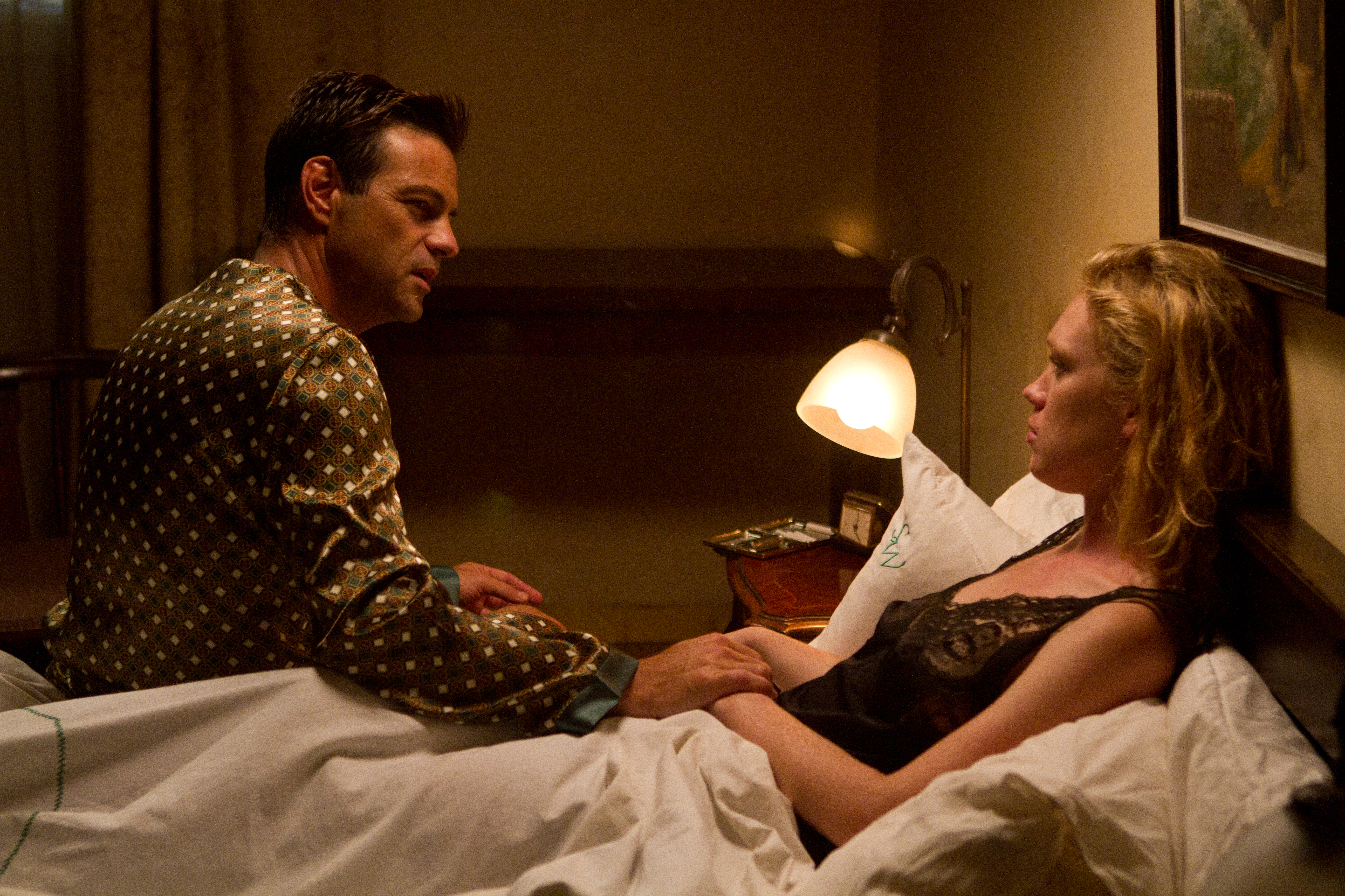 אלונה איב ואקי אבני בסרטה של דינה צבי ריקליס ברקיע החמישי